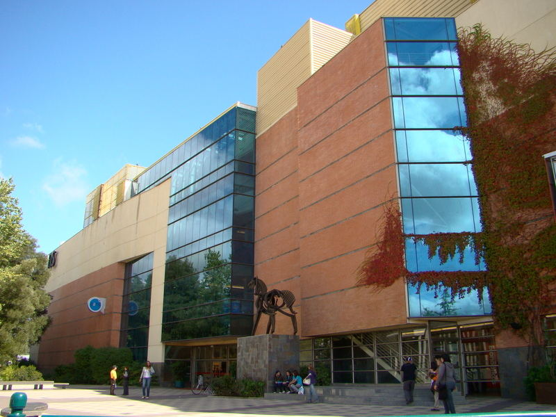 Todos los derechos pertenencen al autor de ésta imagen.